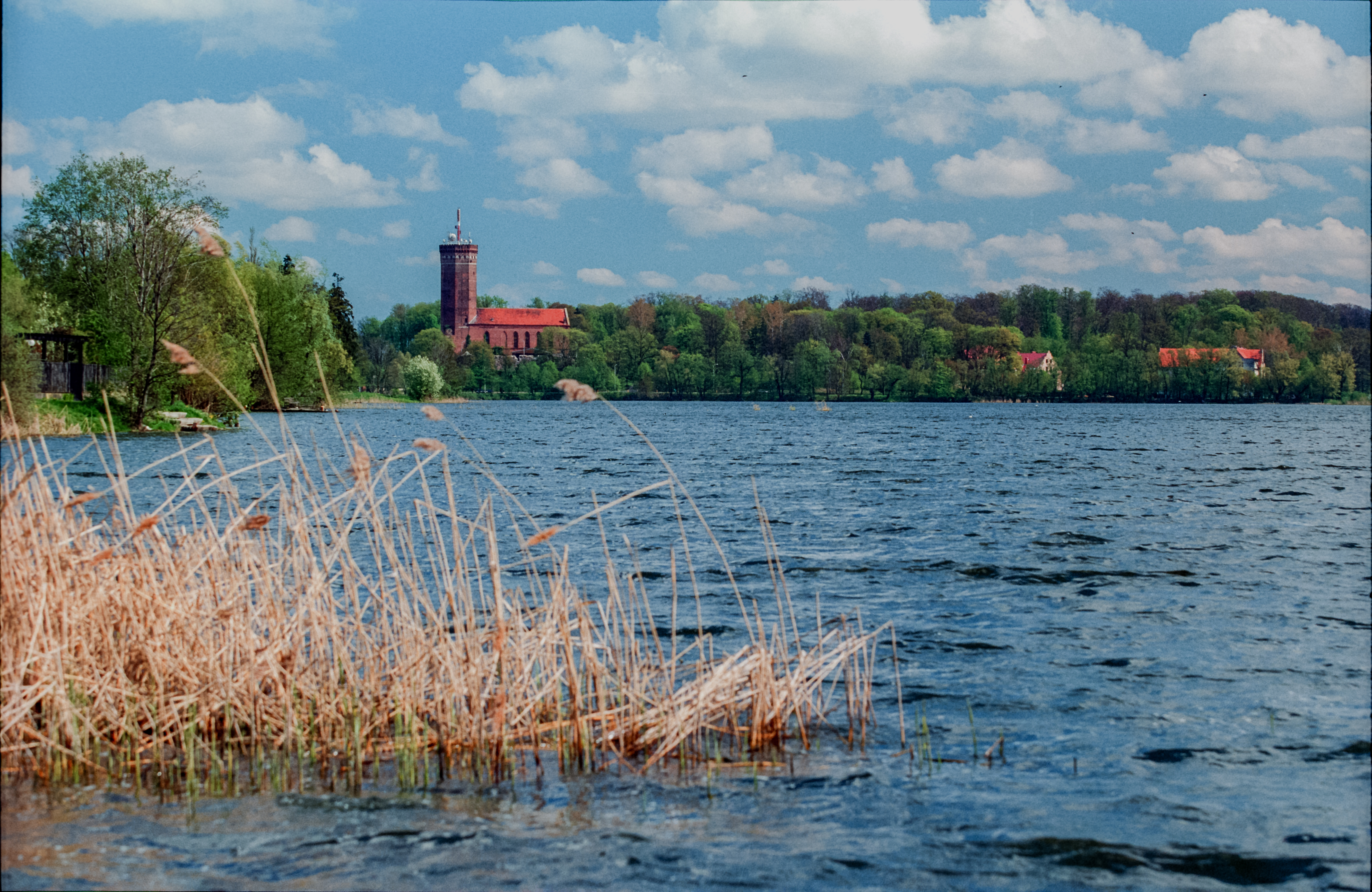 Człuchów, wieża zamkowa